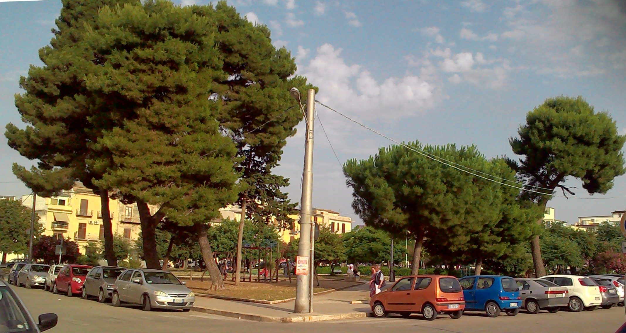 Piazza della Republlica (lato Nord)